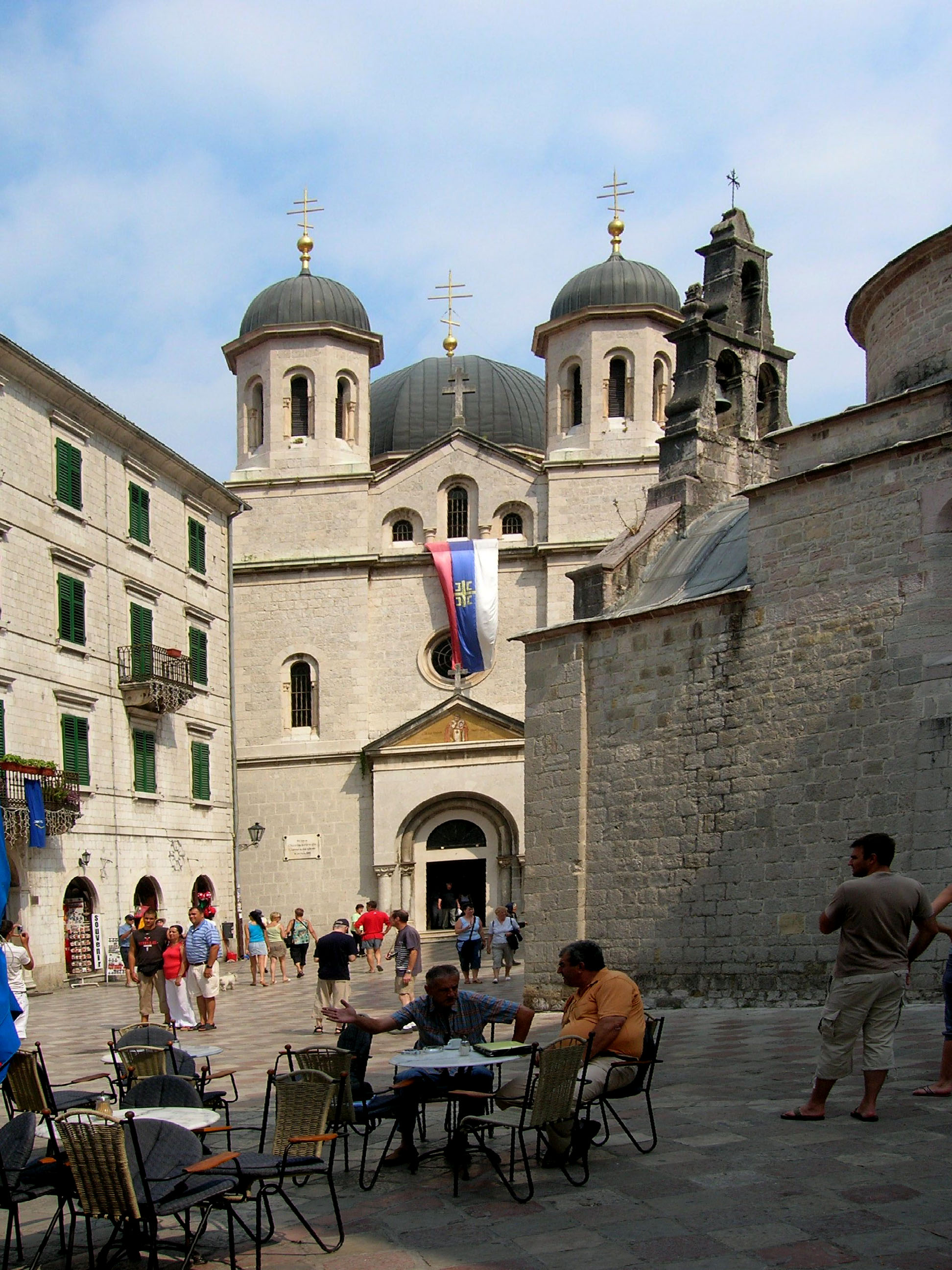 D'Neklooskierch vu Kotor .